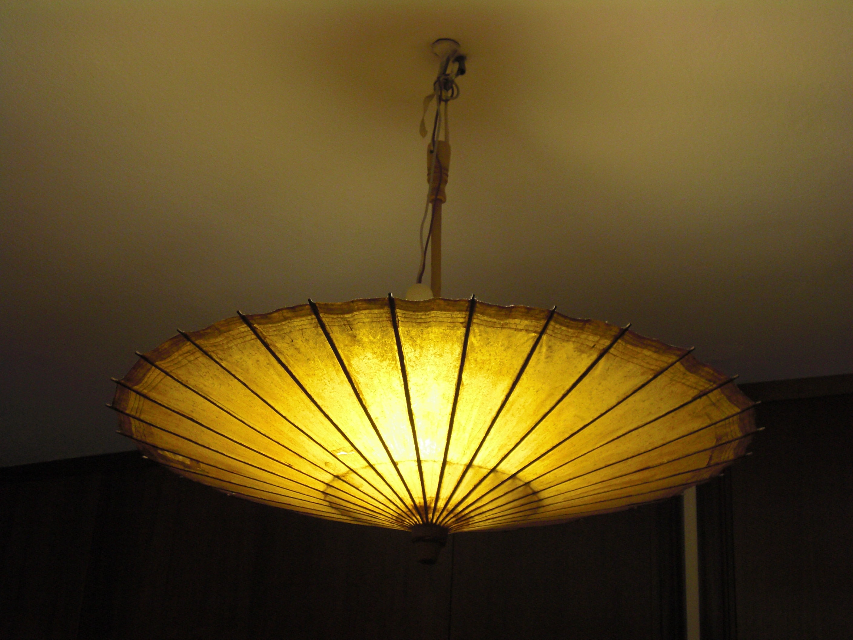 Ombrelo kiel lampŝirmilo